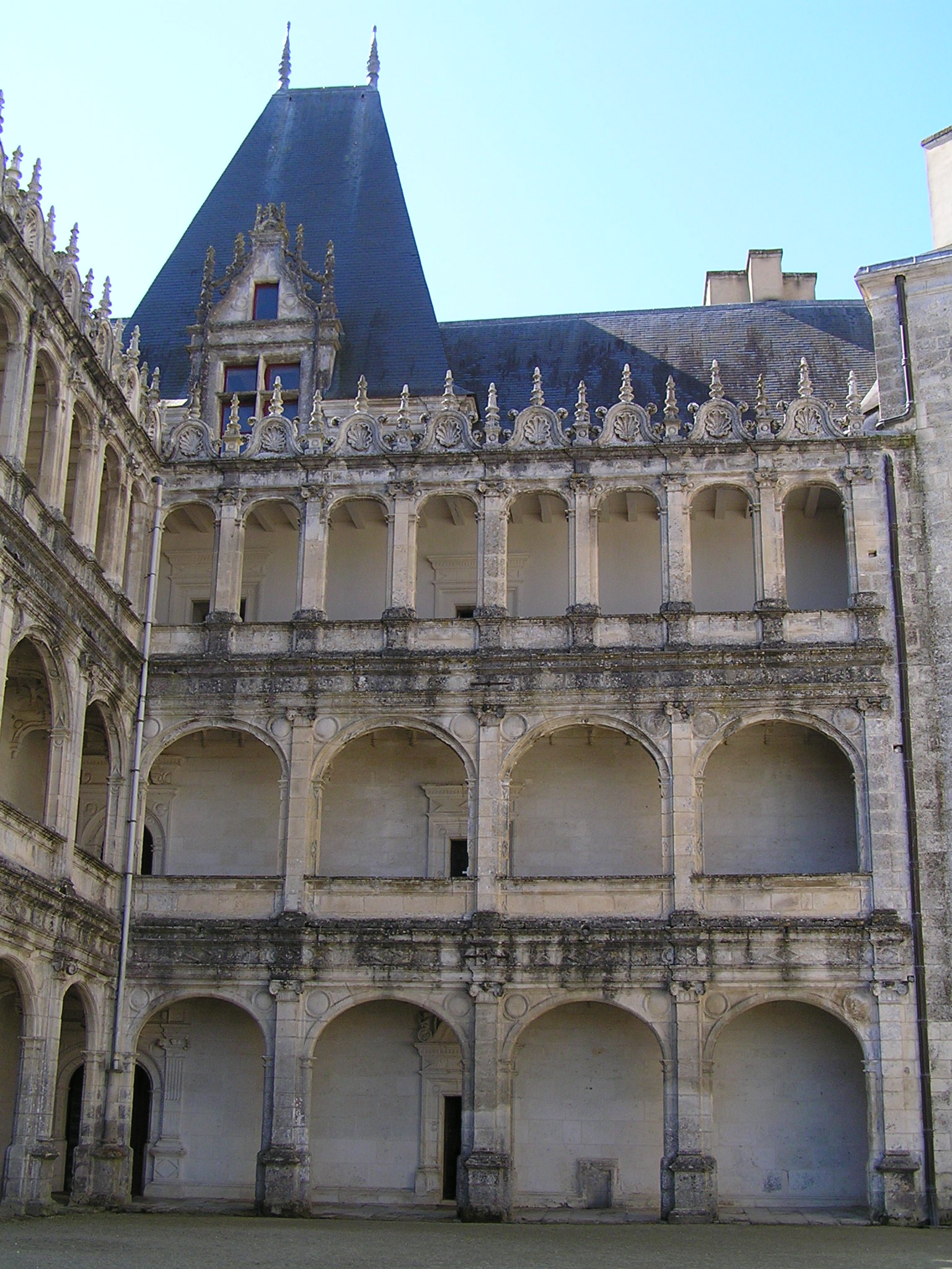 château de La Rochefoucauld en Charente